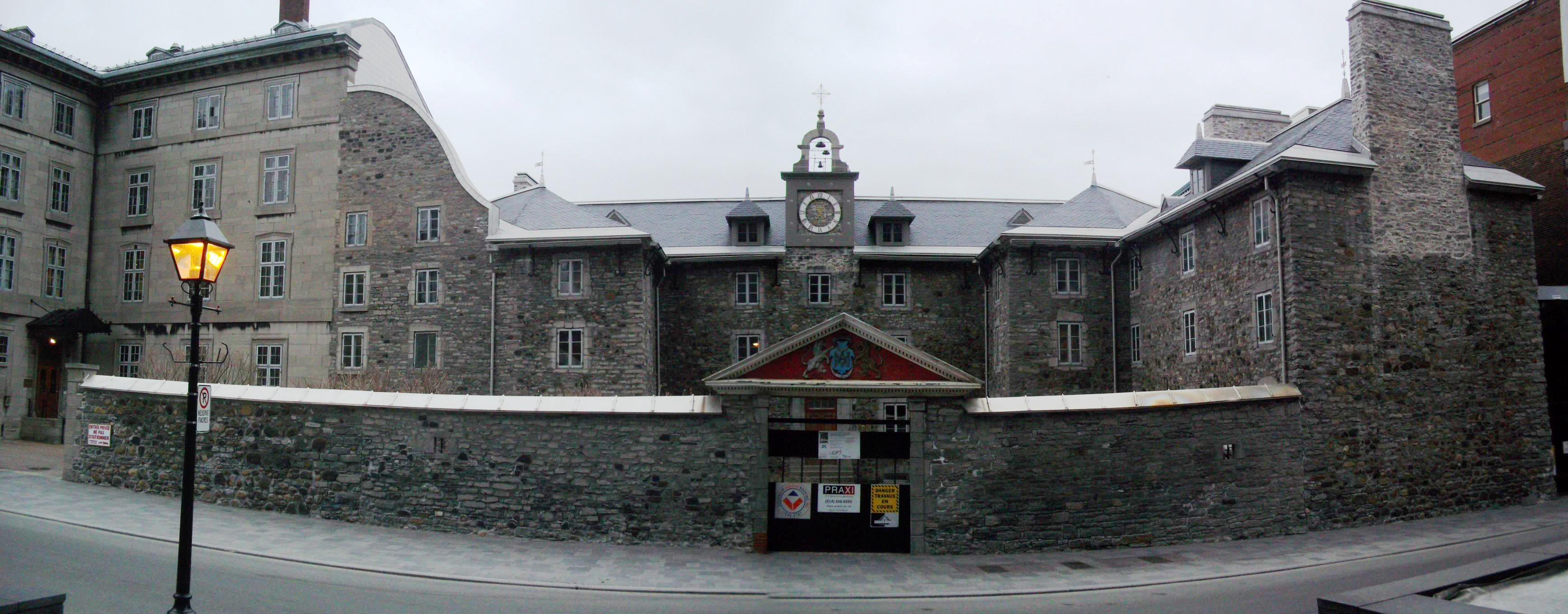 Le Vieux Séminaire de Saint-Sulpice, au 116 Notre-Dame Ouest, à Montréal. Construit en 1684 sur des plans de François Dollier de Casson.